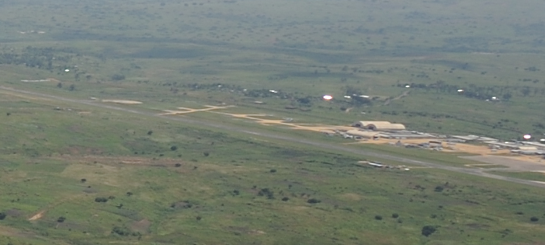 vue aérienne de la base de la MONUC [ancienne base]. Au fond à droite, l'aéroport de Bunia.